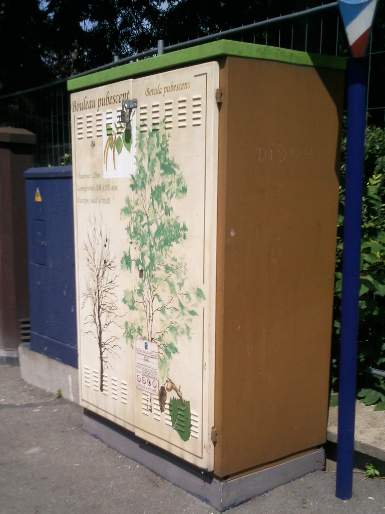 Une armoire technique peinte à Drancy, rue de la République.